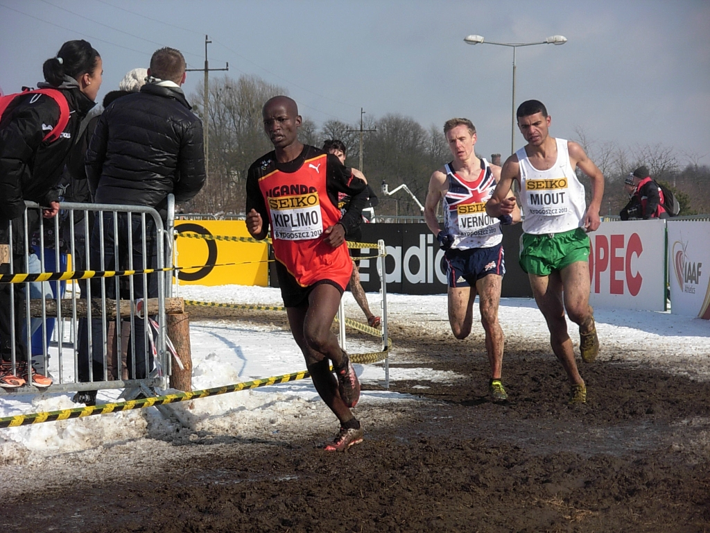 Mistrzostwa Świata w Biegach Przełajowych IAFF 2013 w Leśnym Parku Kultury i Wypoczynku Myślęcinek w Bydgoszczy